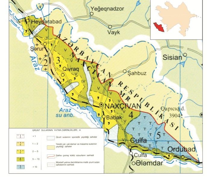 Orta Araz təbii vilayətində qrunt sularının səviyyəsi